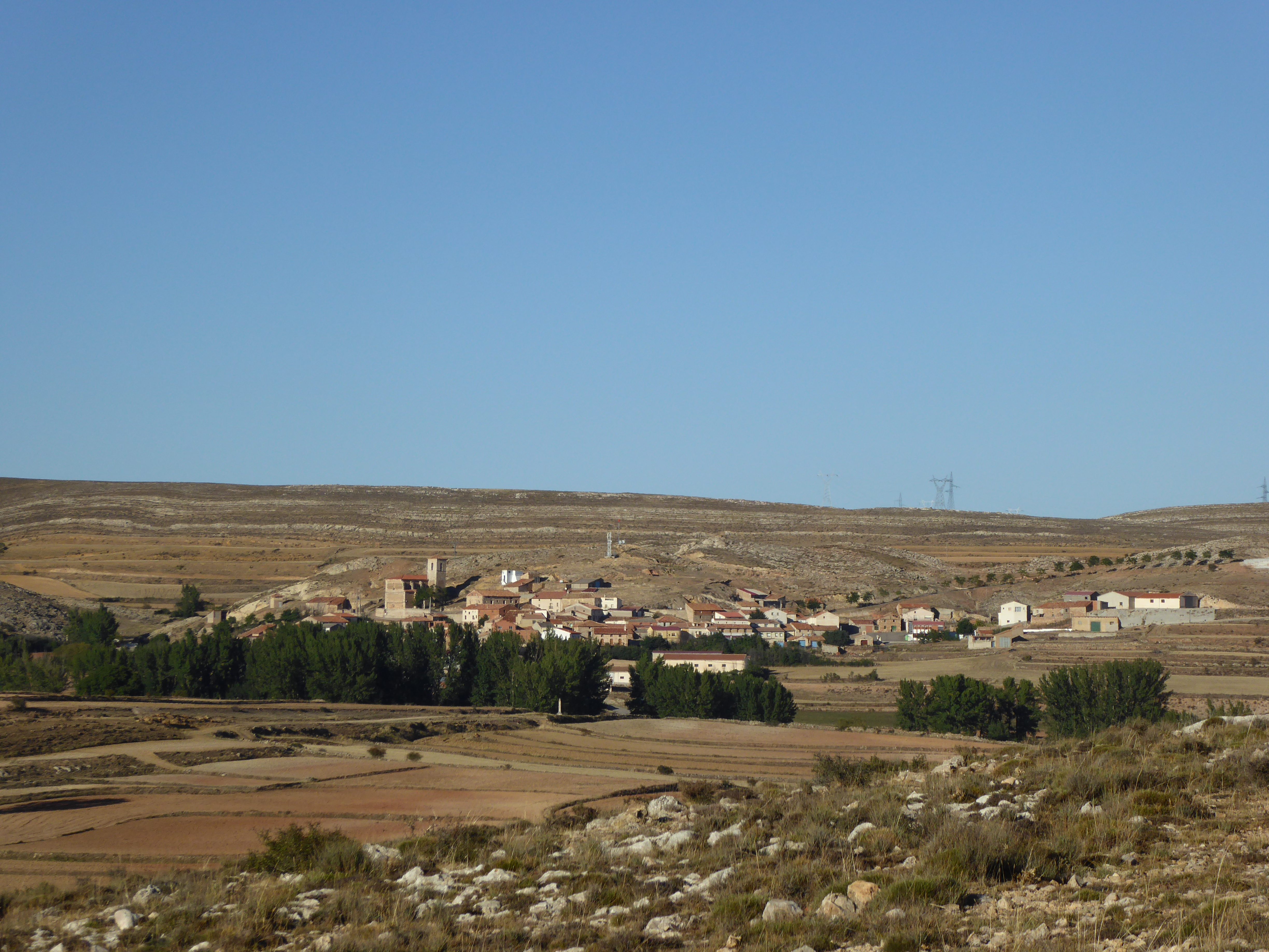 Municipio español de Cañada Vellida desde la N-420